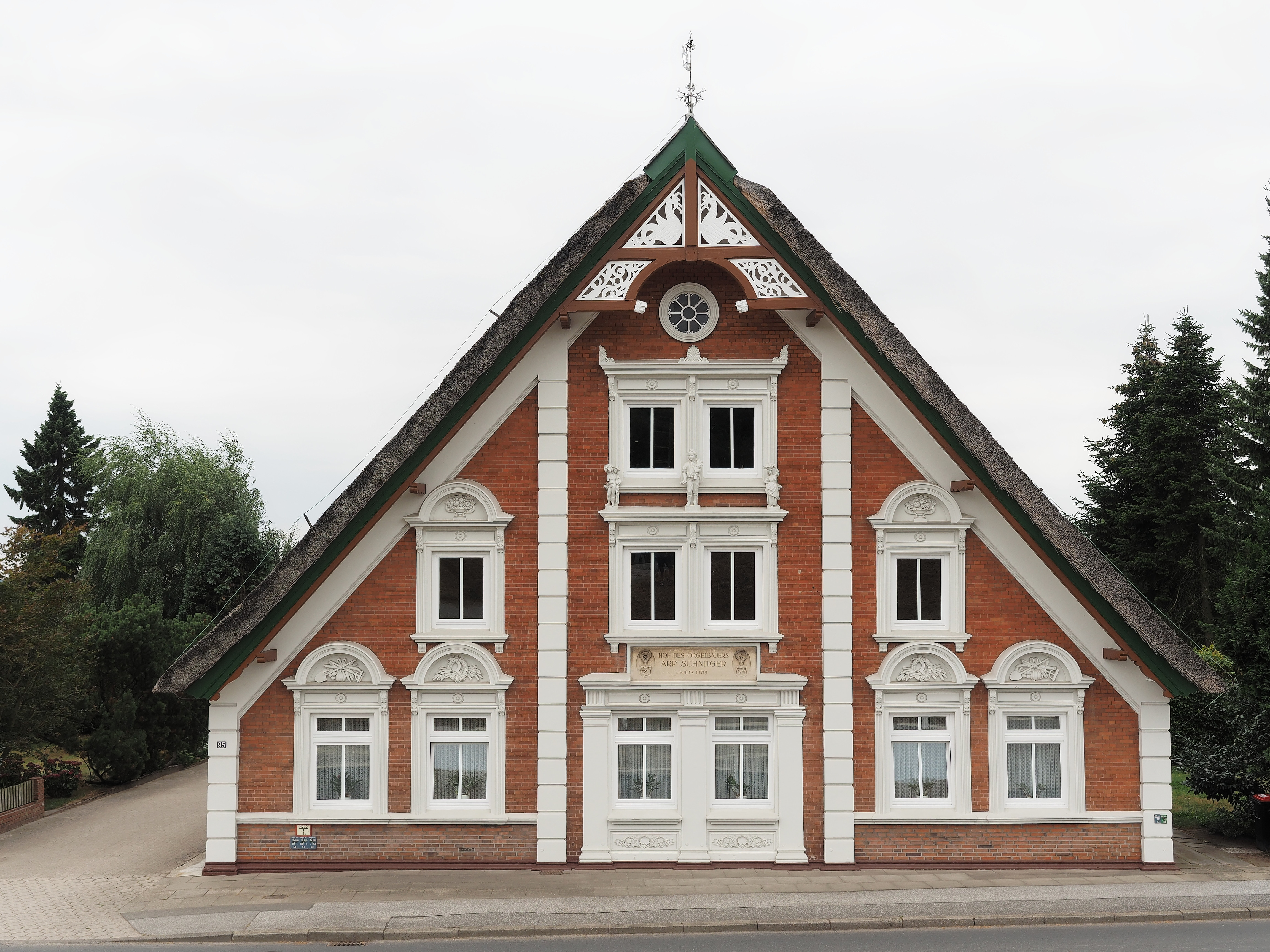 Hof des Orgelbauers Arp Schnitger in Neuenfelde im Alten Land, Stadtteil von Hamburg